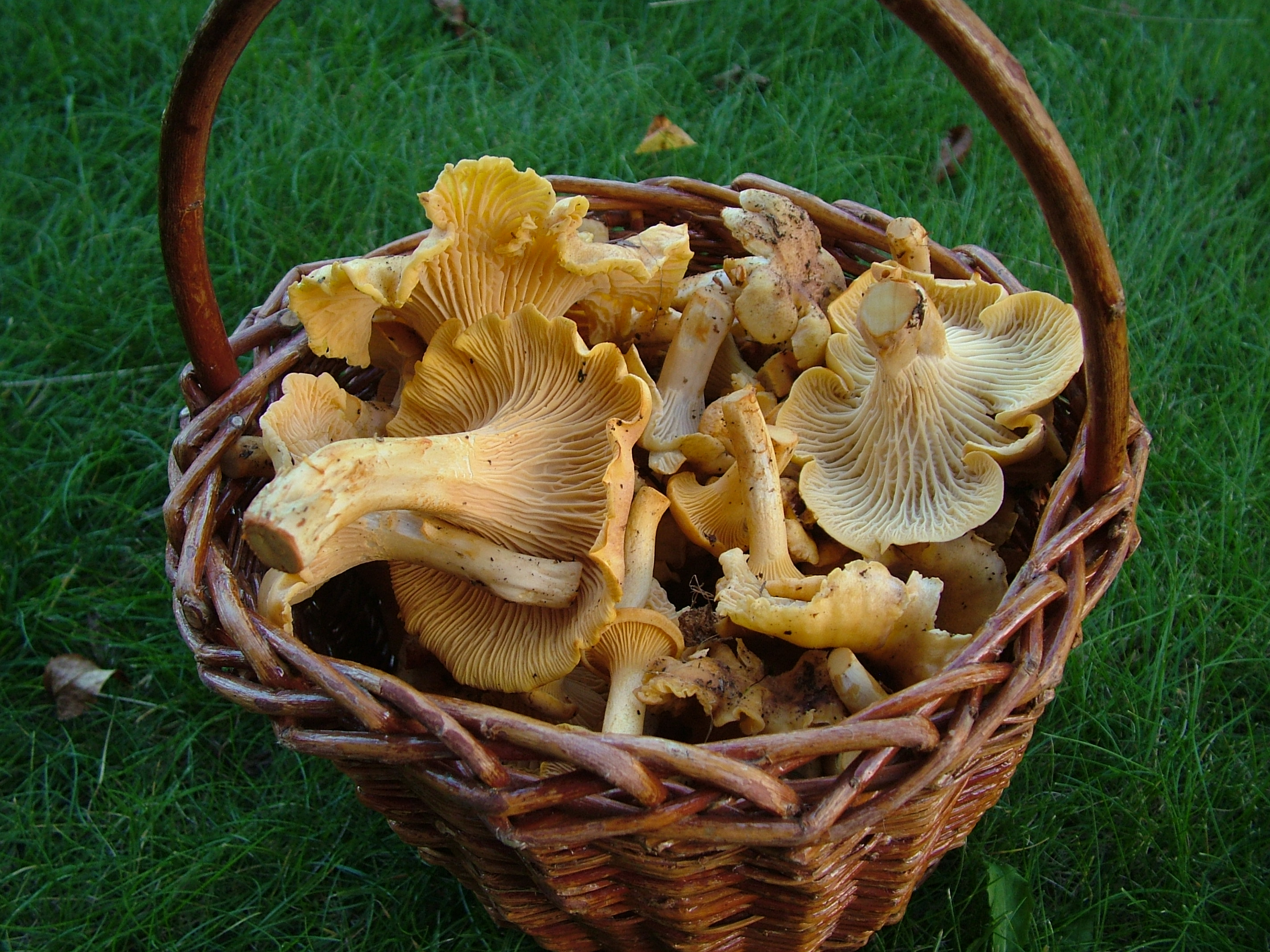 Liška obecná (Cantharellus cibarius), lokalita: Trhový Štěpánov, mikroregion Český Smaragd, Podblanicko